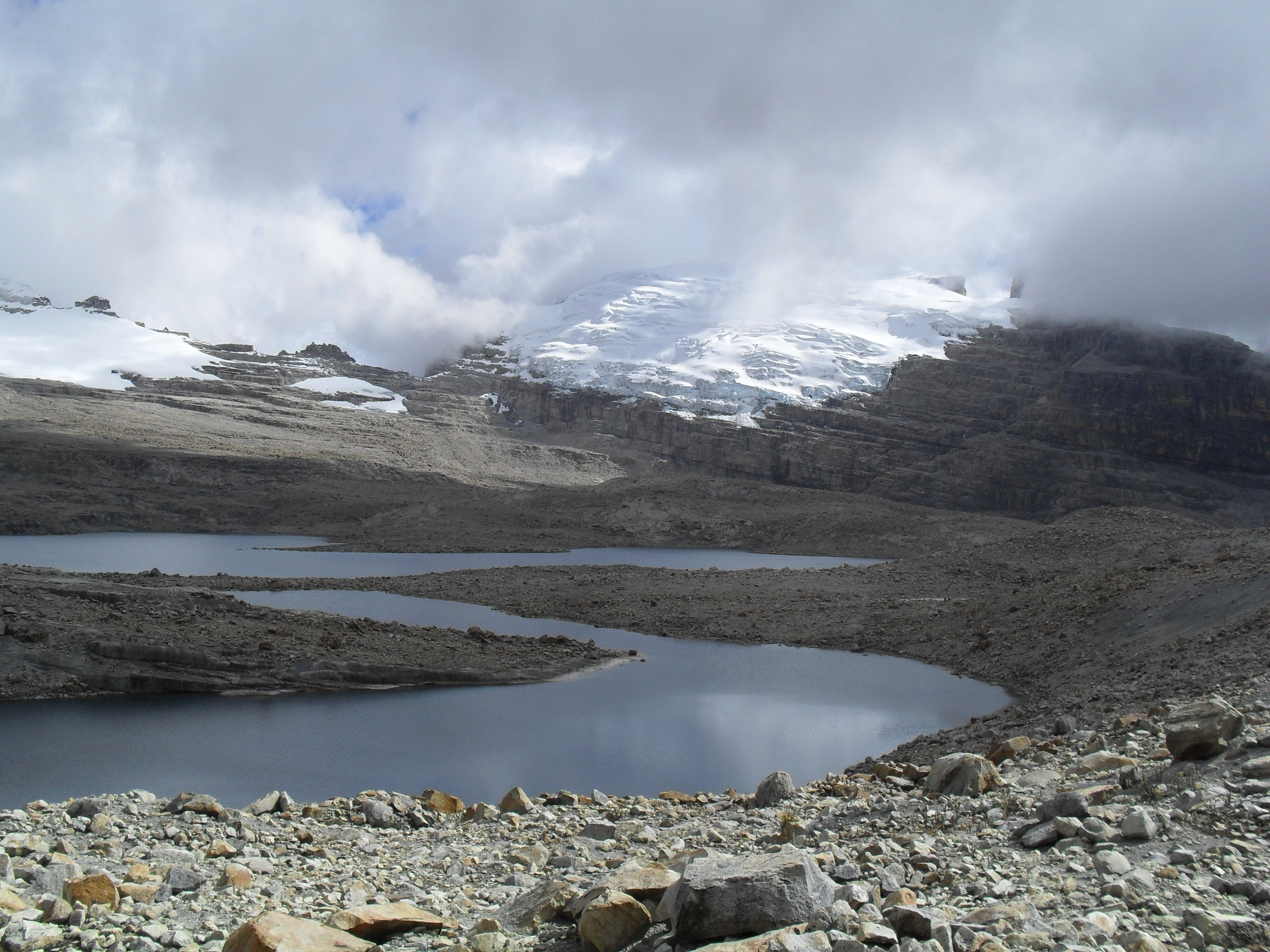 Laguna Grande de la Sierra, Sierra Nevada del Cocuy, Colombia